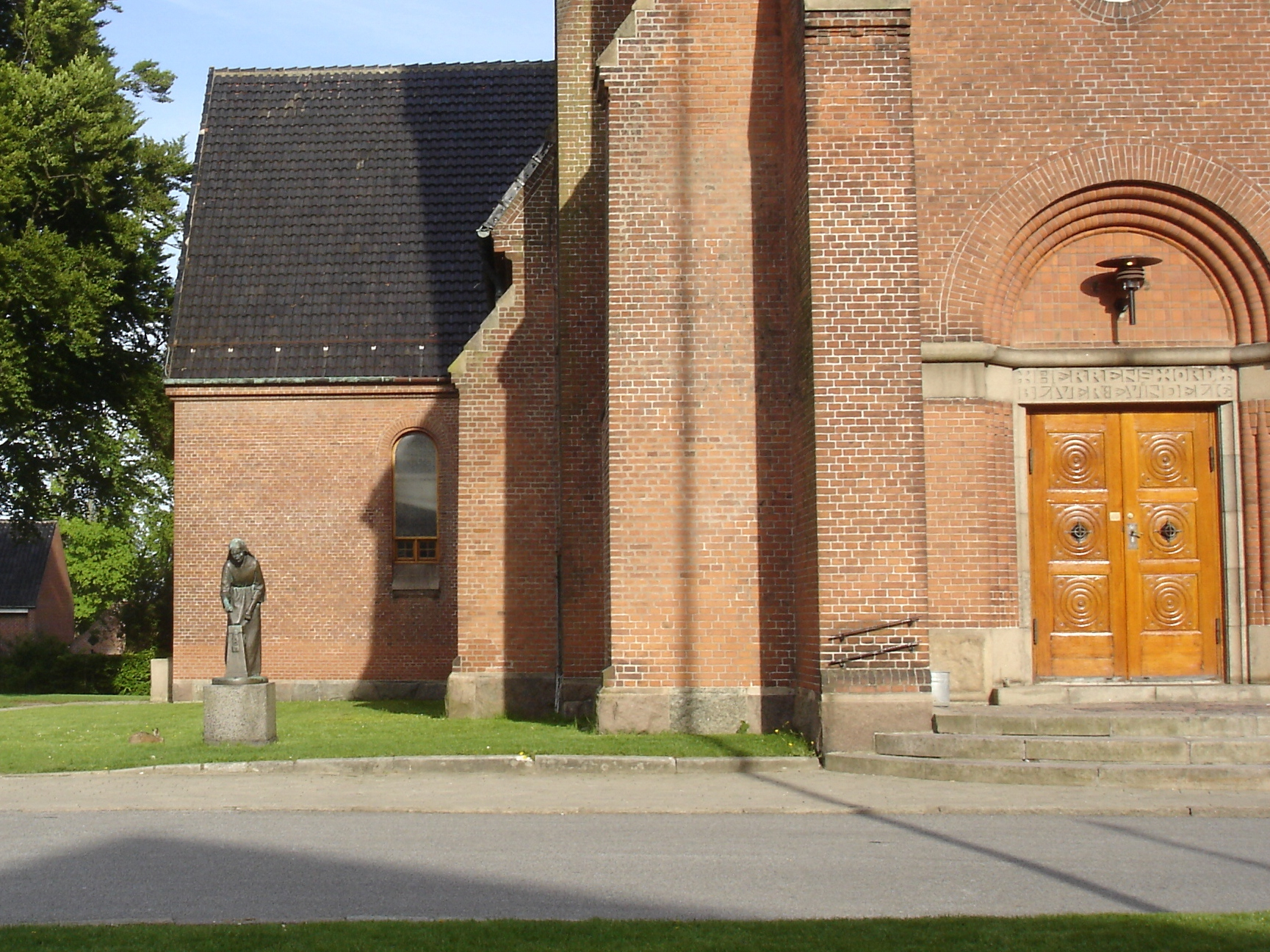 Den fattige enkes skærv, skulptur udenfor Sankt Johannes Kirke i Aarhus, udført af Elias Ølsgaard, set fra V